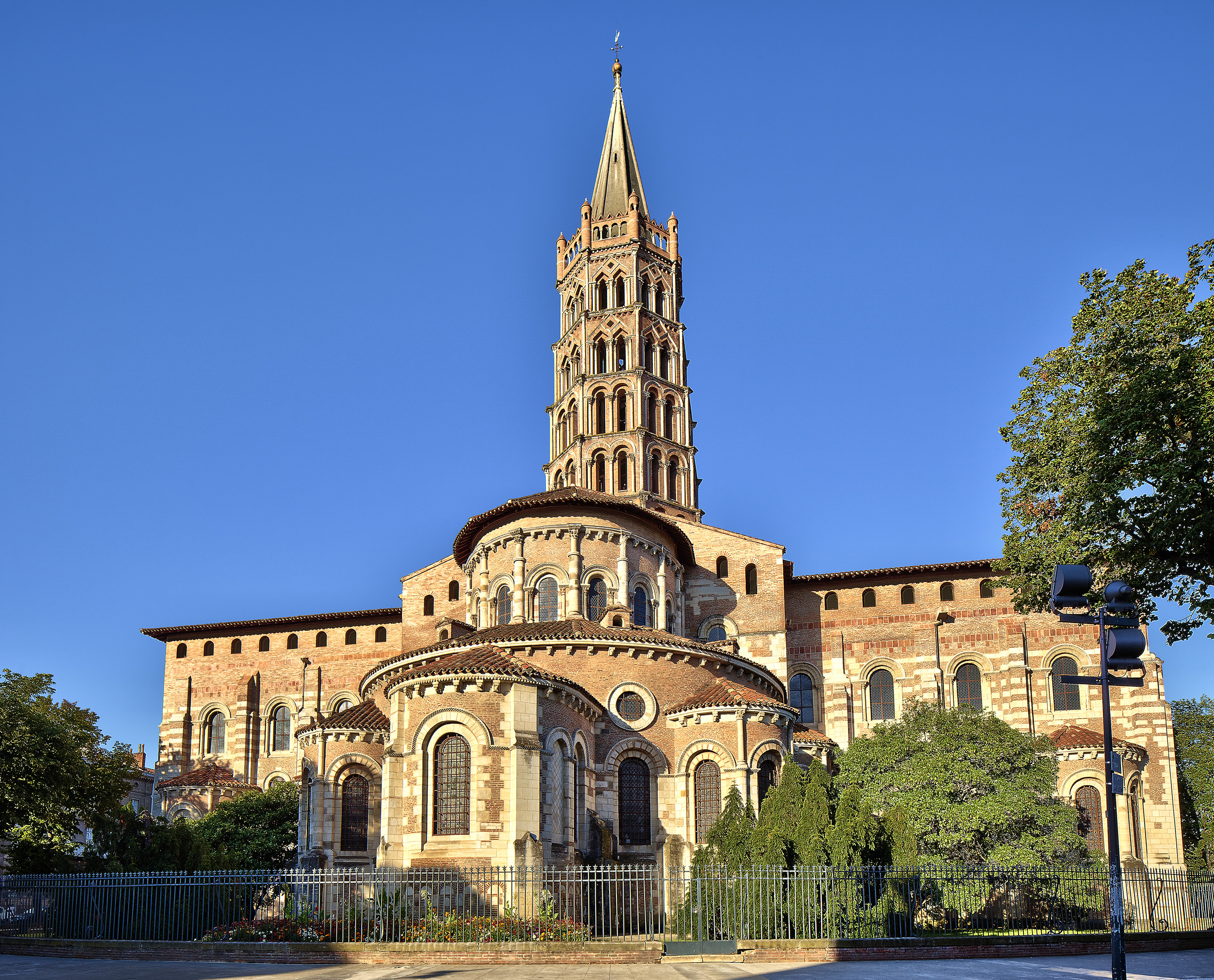 Basilique Saint Sernin, Toulouse. .